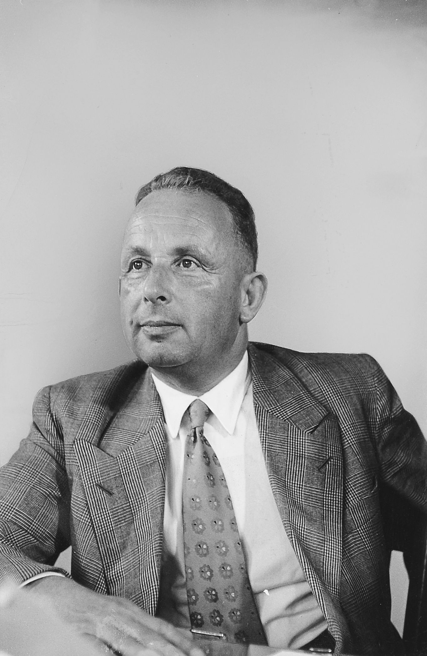 Porträt Hans Munz